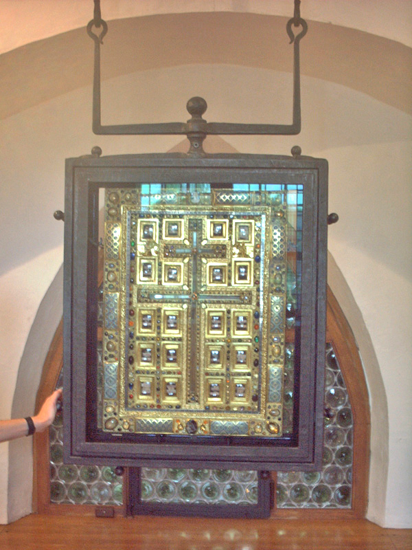 Kräiz Reliquie an der St Matthias Basilika